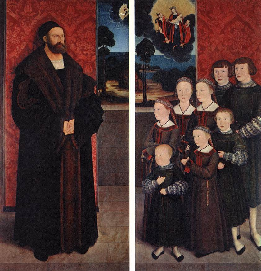 Conrad Rehlinger mit bodenlanger Biberschaube.(nach Alexander Tuma: Die Geschichte der Kürschnerei, Verlag Alexander Tuma, Wien 1967, S. 197)